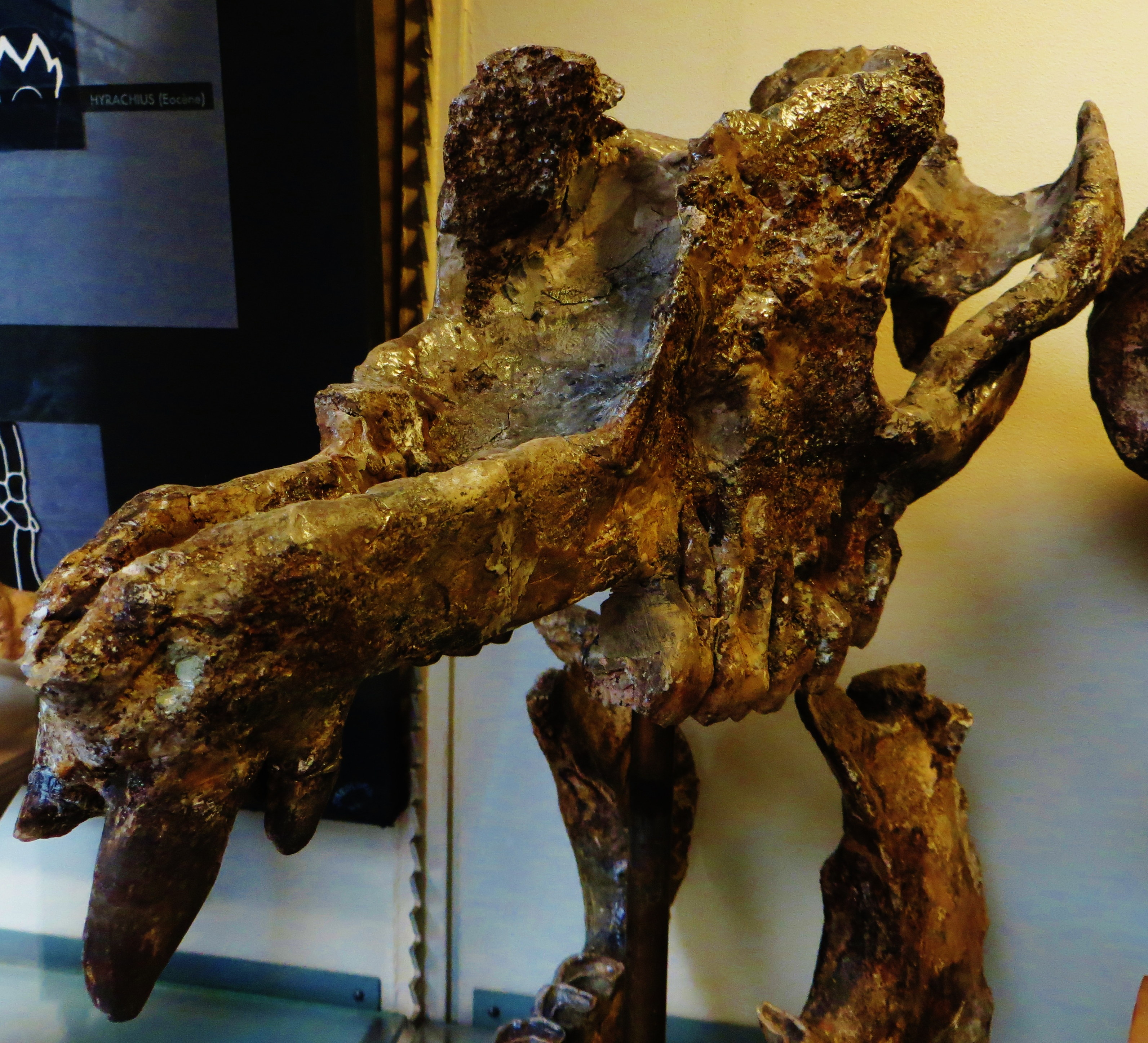 Fossil of Ronzotherium, an extinct mammal - Took the photo at Musee d'Histoire Naturelle, Paris